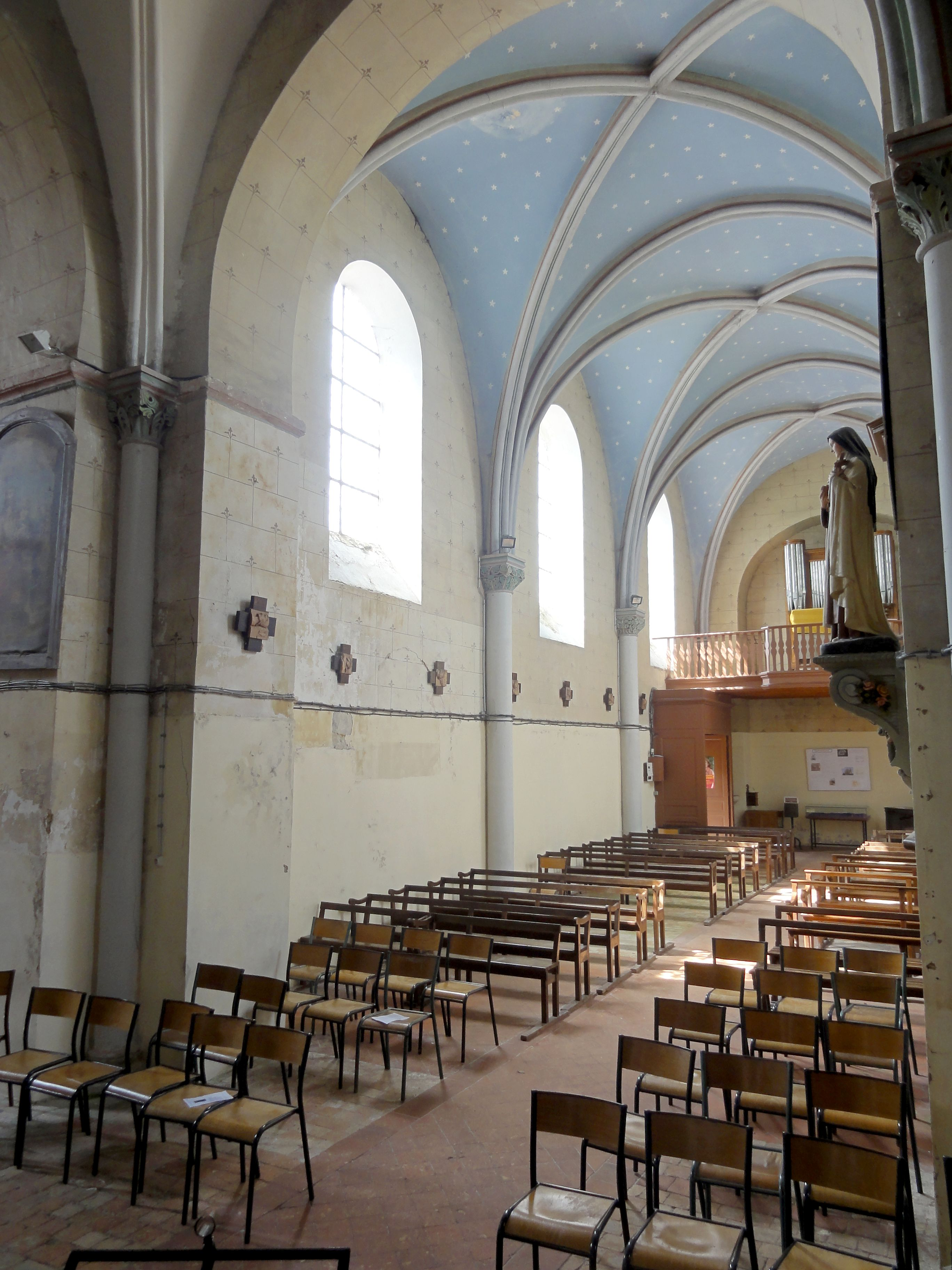 Croisée, vue vers l'ouest.